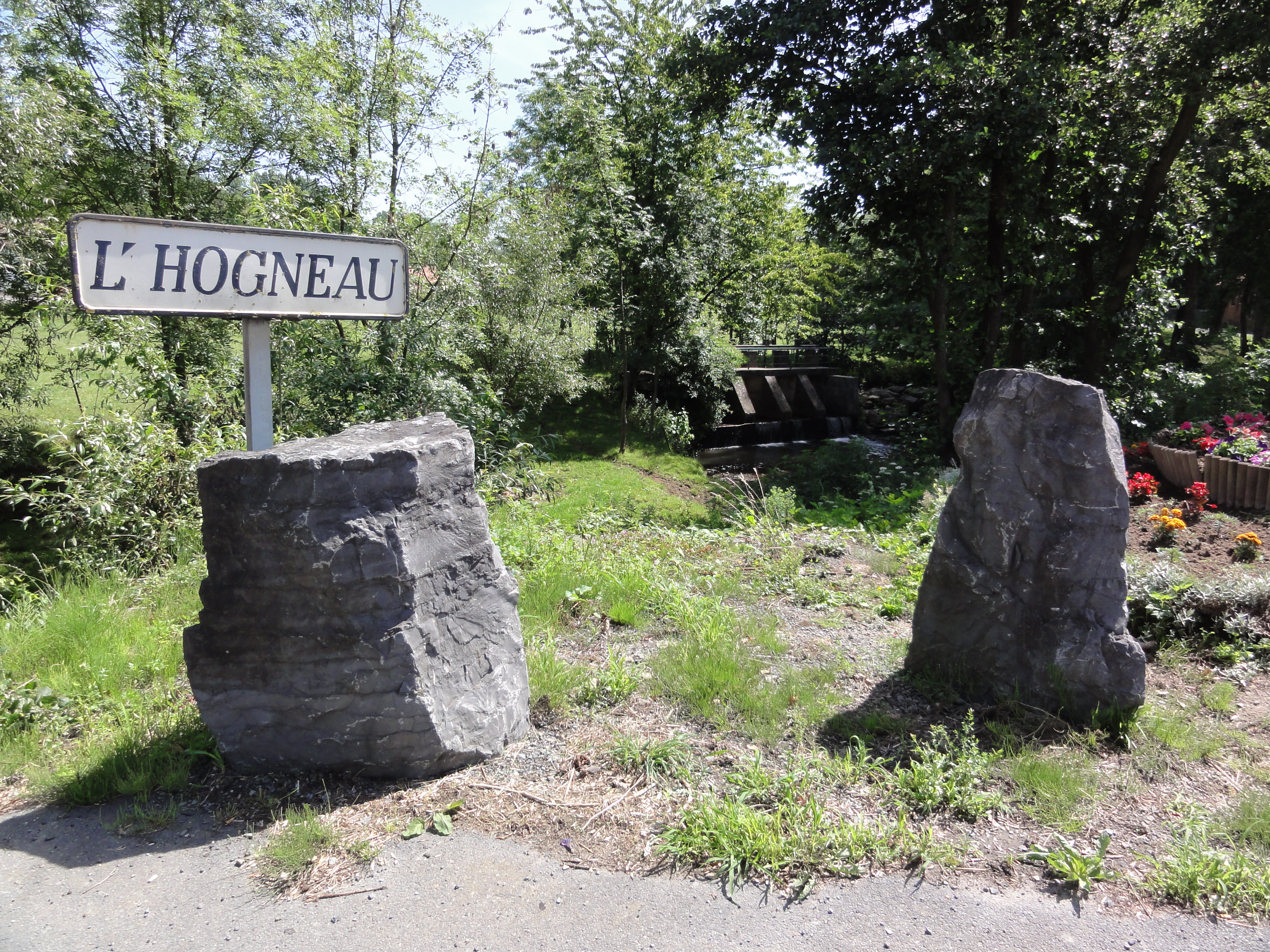 Houdain-lez-Bavay (Nord, Fr) l'Hogneau (panneau)